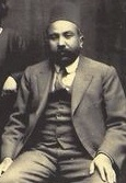 רפאל חיים הכהן, 1926